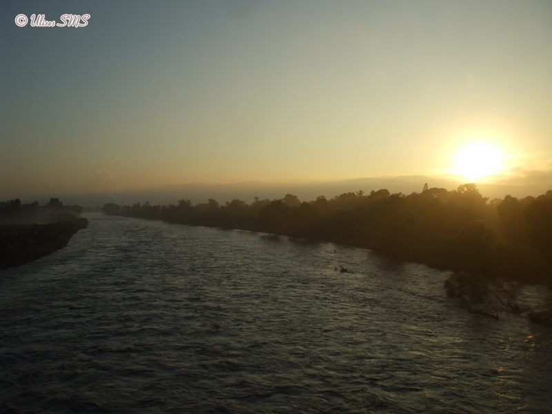 Ocaso en el Rio Cazones